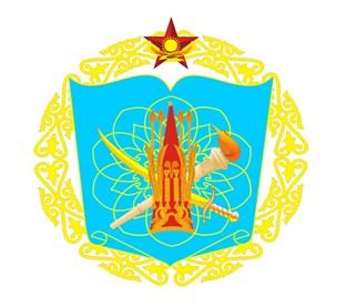 Эмблема Национального университета обороны Вооружённых сил Республики Казахстан